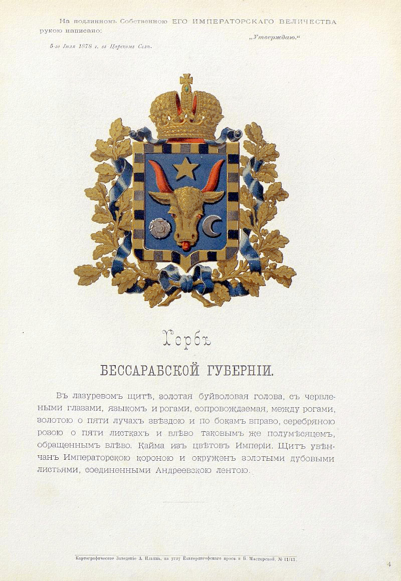 Official Russian Empire coat of arms Bessarabia Governorate. Герб Российской Империи Бессарабской губернии с официальным описанием в Гербовнике Министерства внутренних дел Российской Империи 1880 года. Утверждён Императором Всероссийским Александром Вторым.